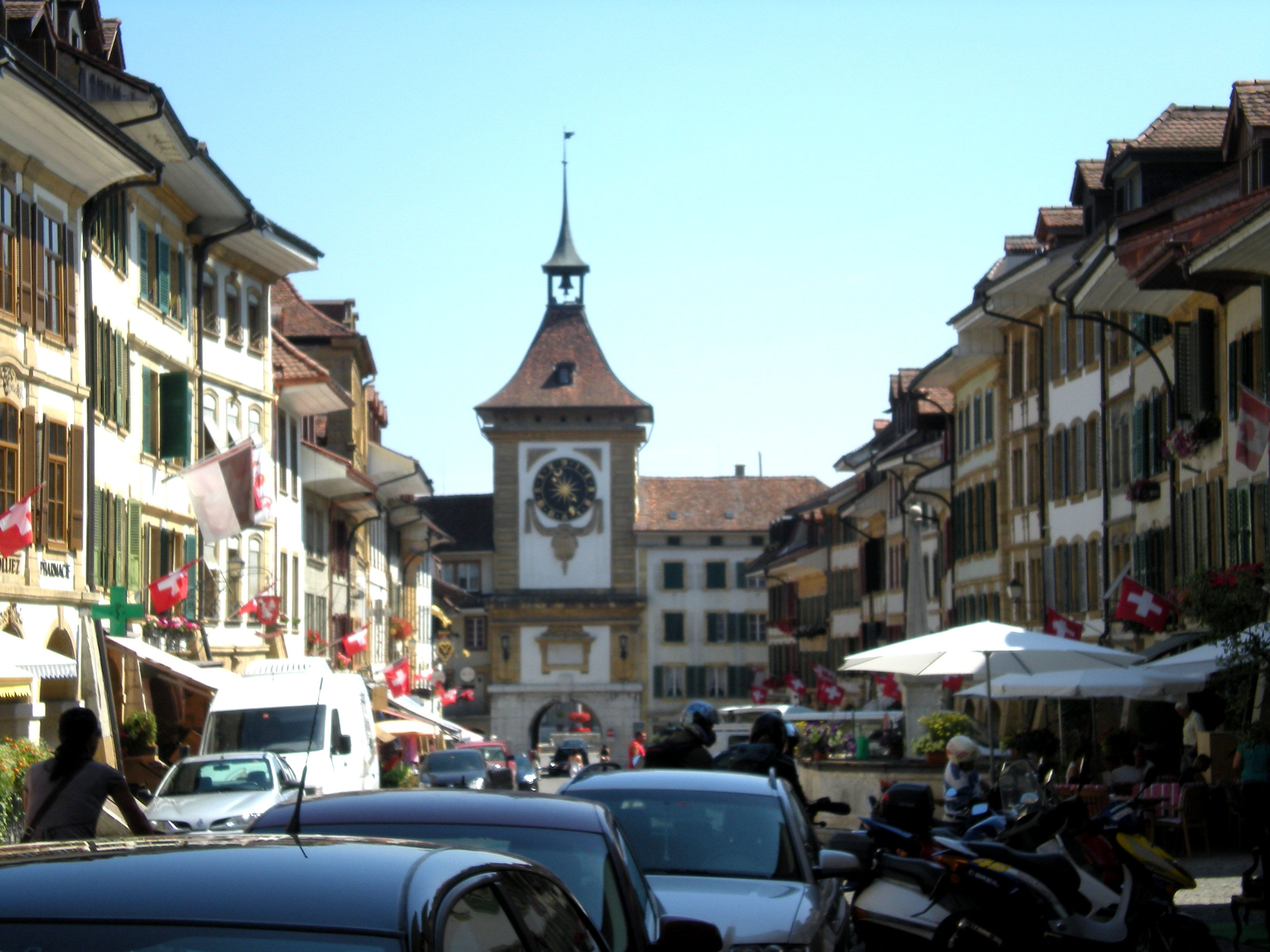 La Hauptgasse es la calle principal del casco histórico de Murten. Está flanqueada por casas de los siglos XVI y XVII y en uno de sus extremos se levanta la Puerta de Berna.